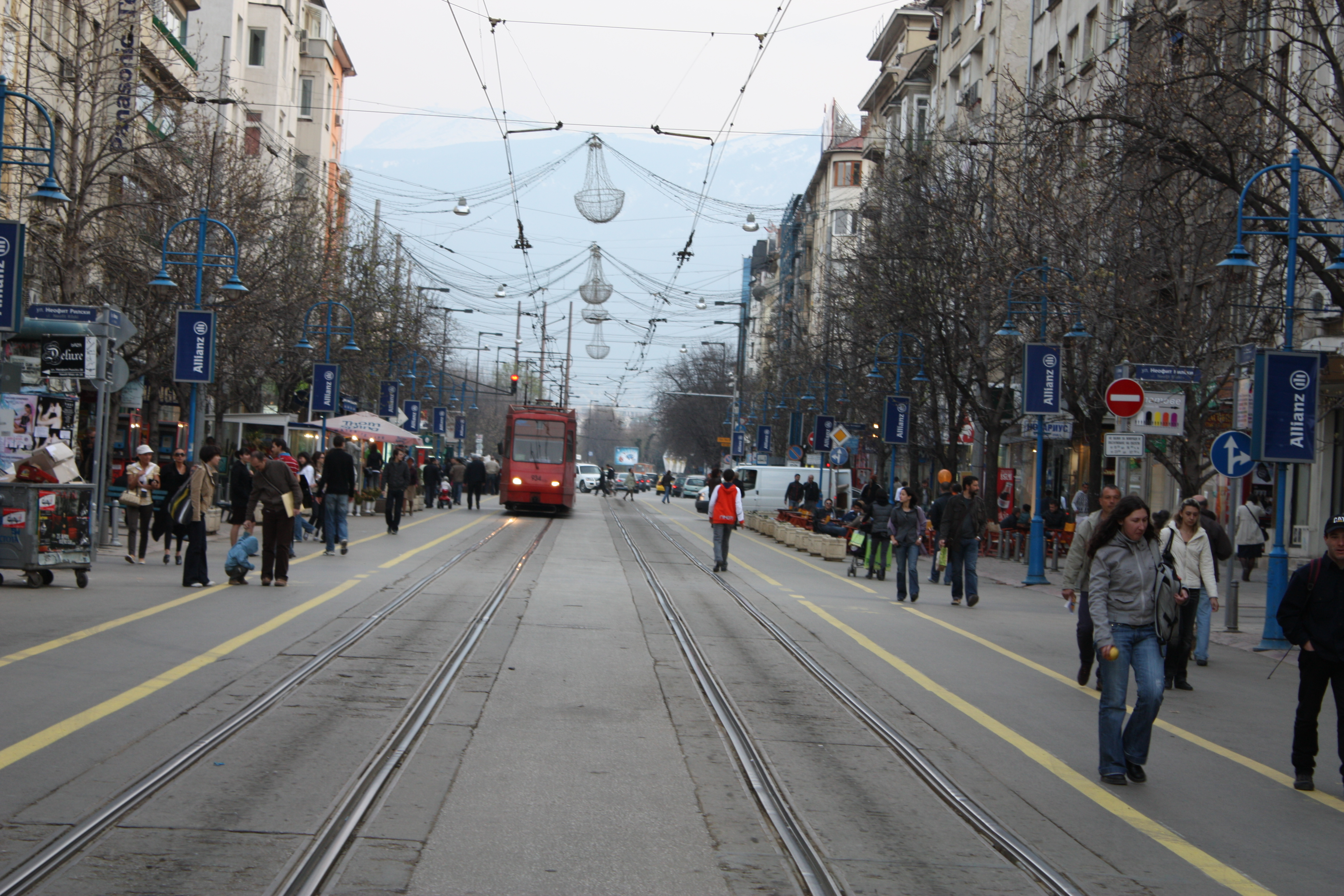 Boulevard Vitosha, Sofia, Bulgaria